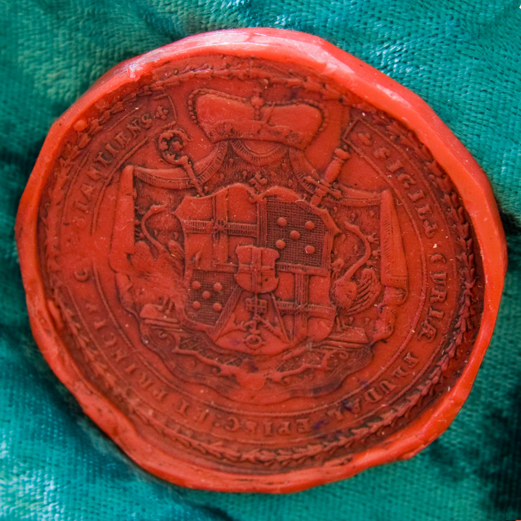 Siegel des Kasimir Anton von Sickingen, Bischof von Konstanz. Sammlung im Meersburger Neuen Schloss.